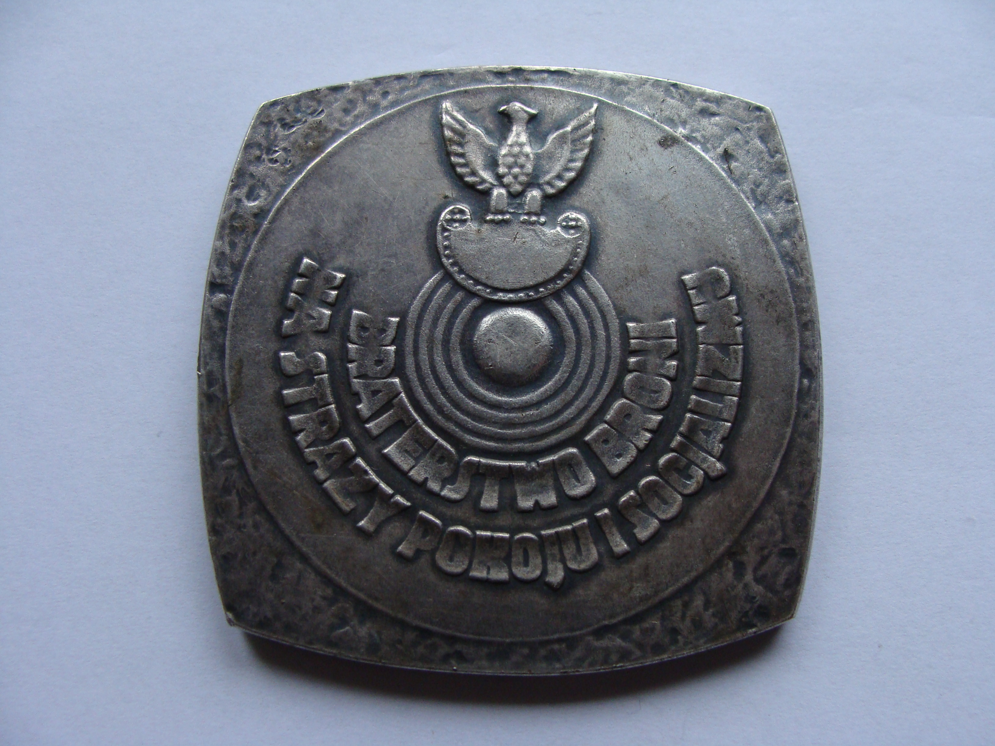 Układ Warszawski medal